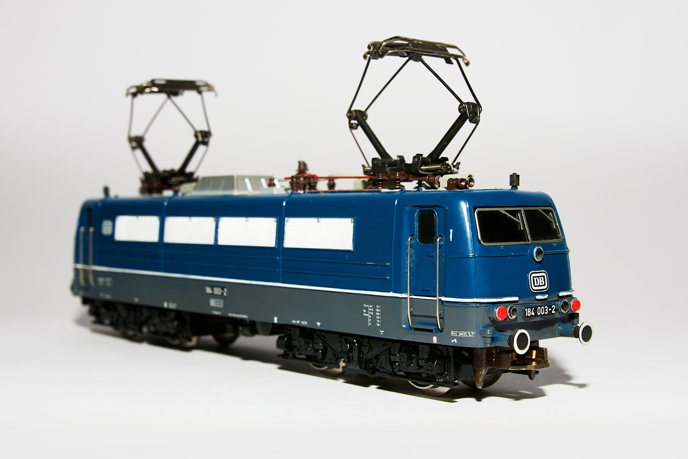 Modello Trix della locomotiva elettrica quadritensione 184 003-2 della Ferrovia Federale Tedesca (Trix Express 2247: E-Lok BR 184 "Europalok", DB)